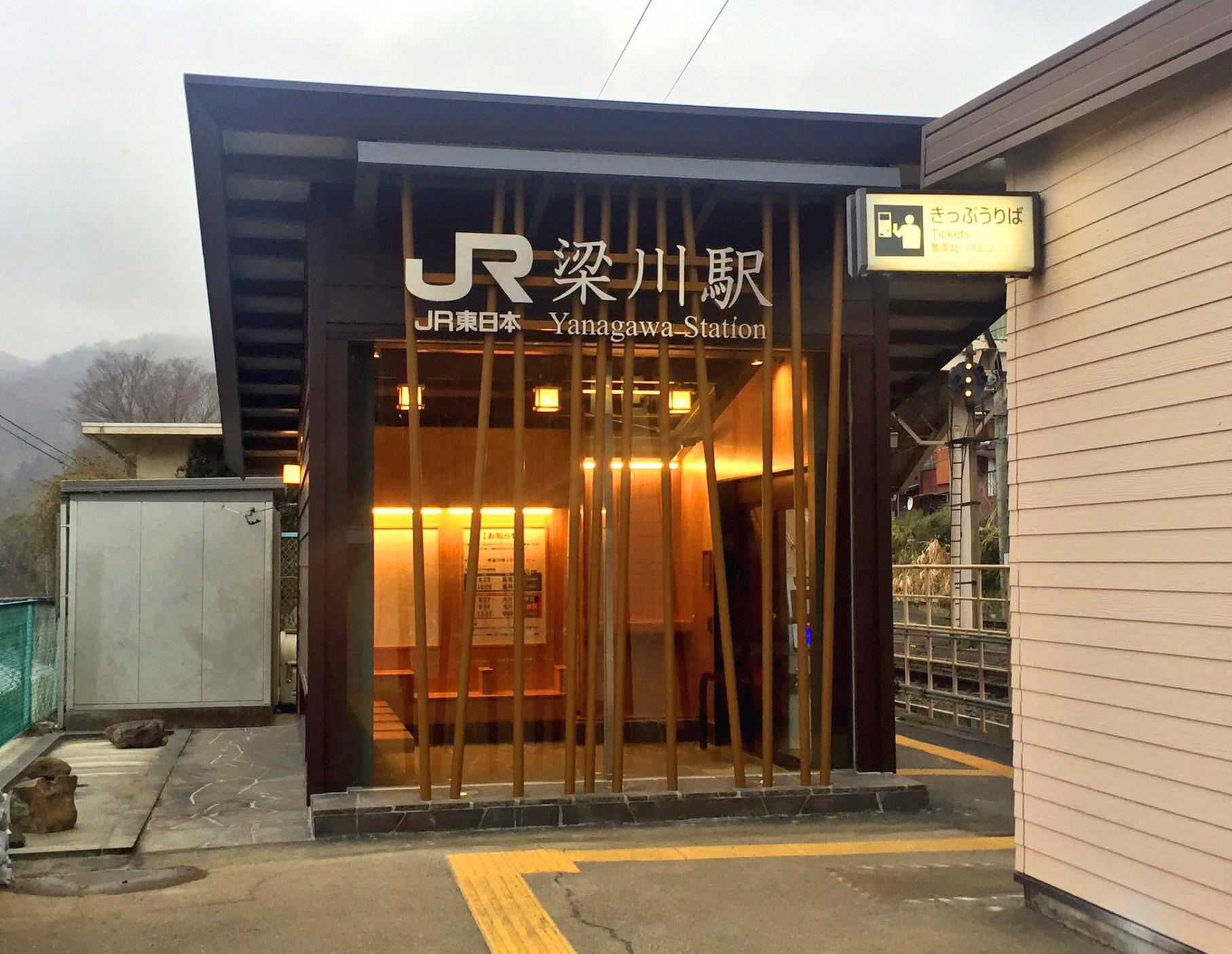 梁川駅舎(2016.3)